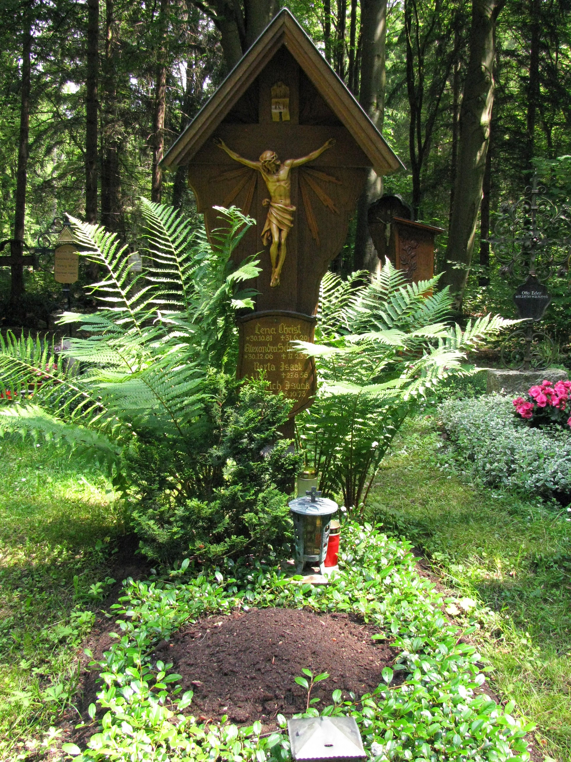 Grab von Lena Christ im Münchner Waldfriedhof.